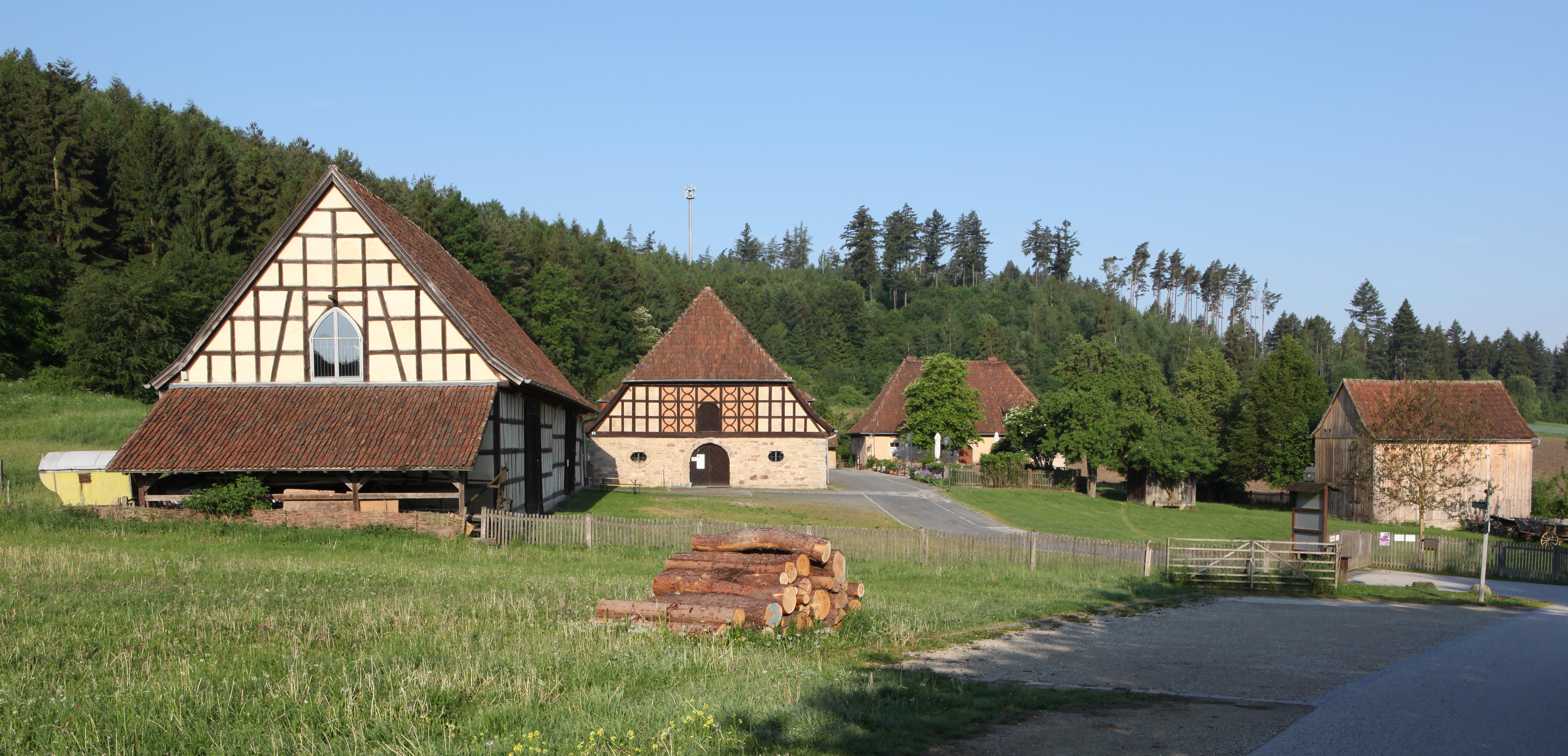 Gerätemuseum und Gutsschäferei, Landkreis Coburg